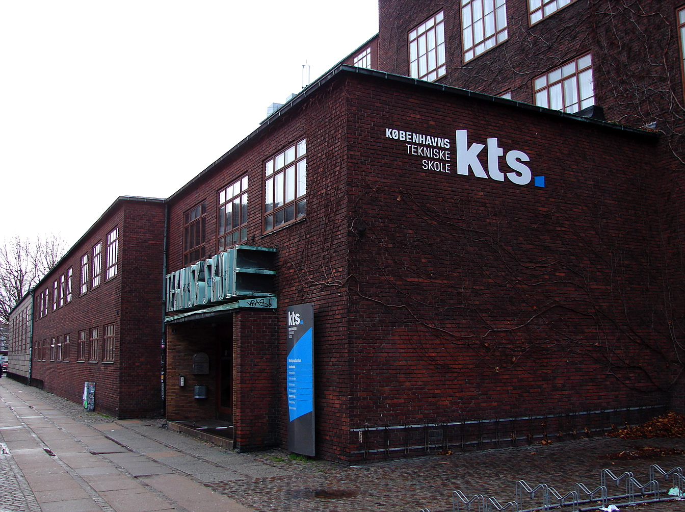 Københavns Tekniske Skole, medieproduktion, efteruddannelse, Julius Thomsens Gade, Frederiksberg